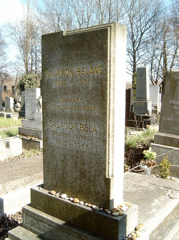 Salamon Béla (Saly Béla, Beregrákos, 1885. március 4. – Budapest, 1965. június 15.) magyar színész, színházigazgató sírja Budapesten. Kozma utcai izraelita temető: 1C-2-29.